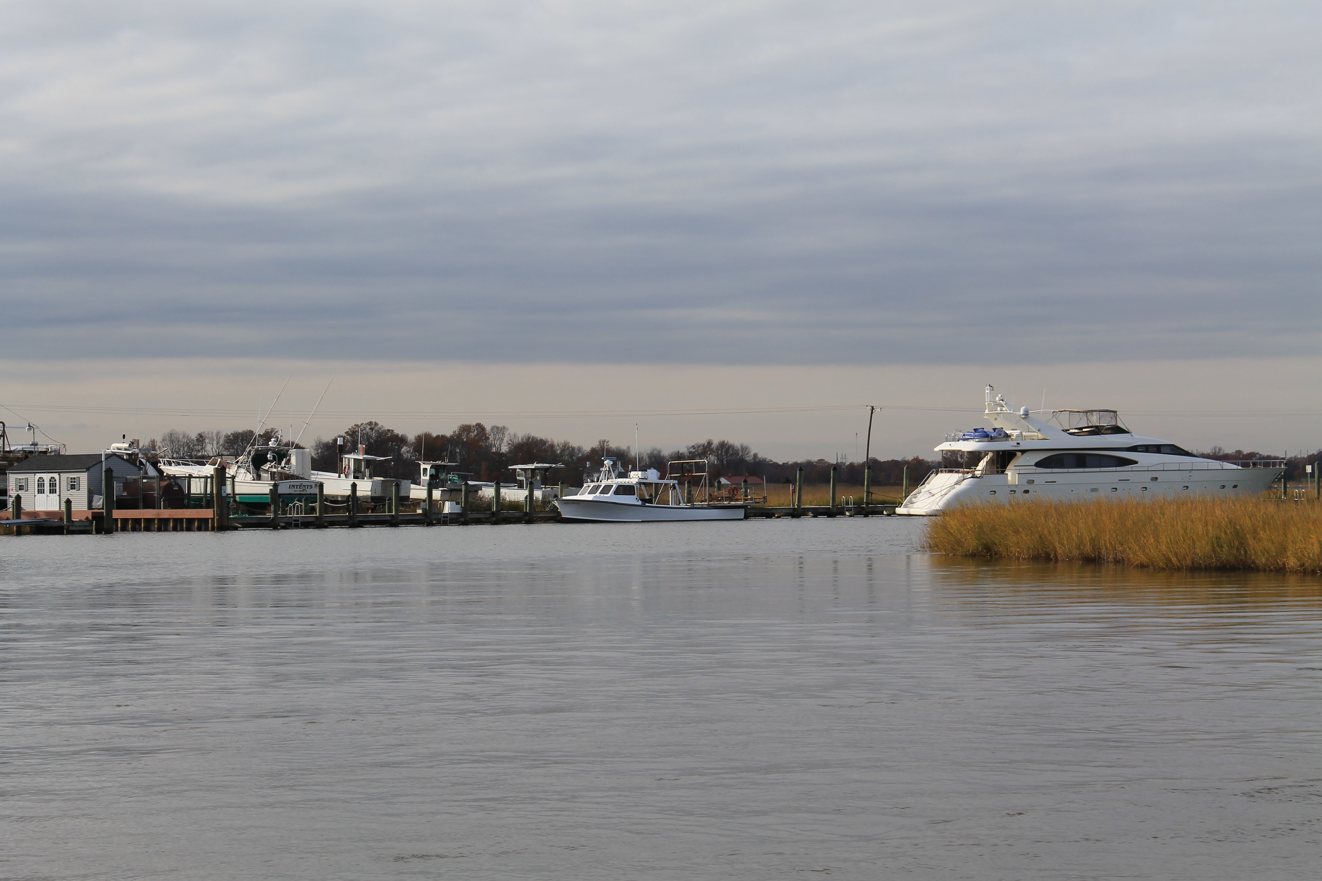 Leipsic